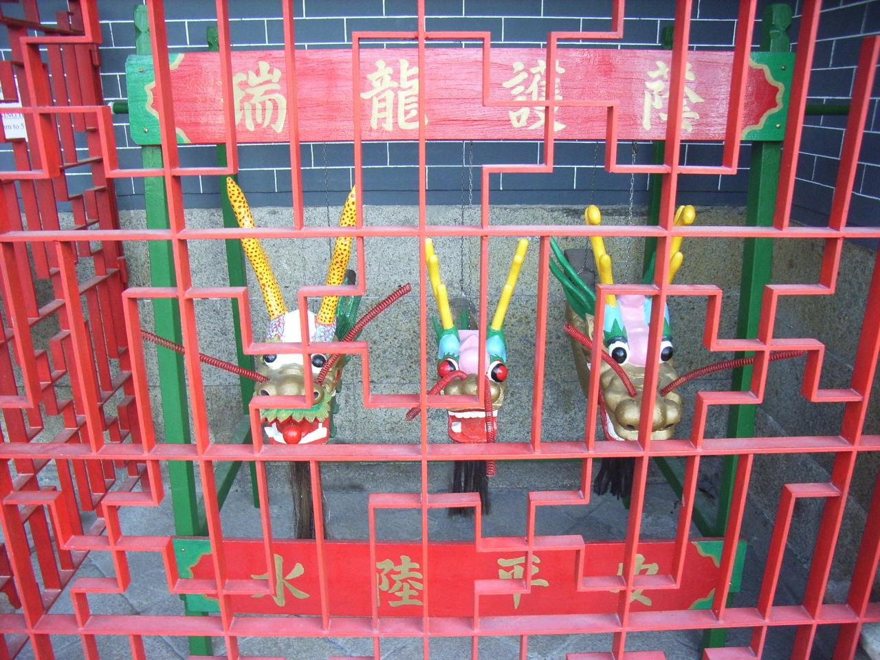 鴨脷洲洪聖廟